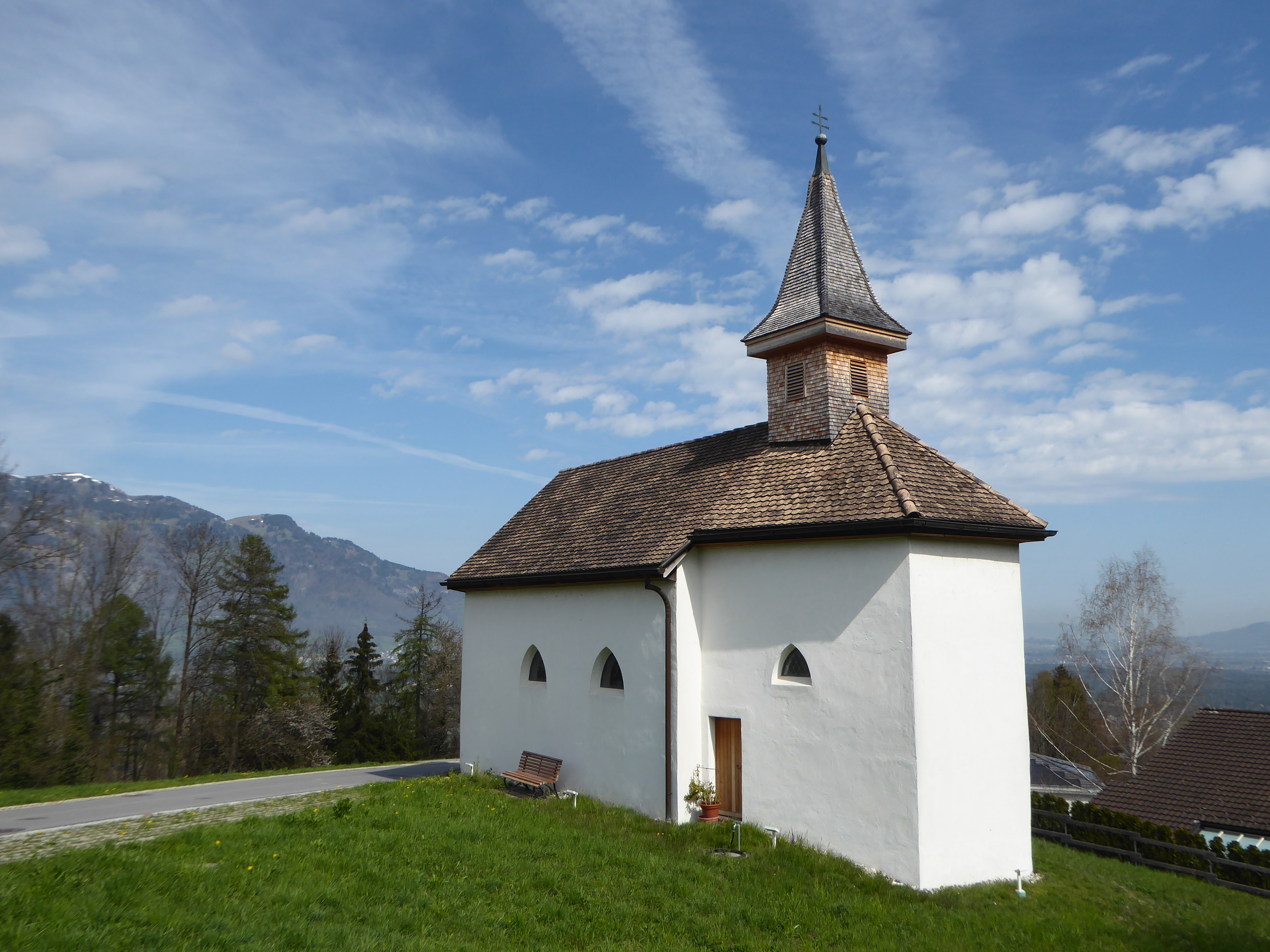 Kapelle St. Georg, Hinterschellenberg, Liechtenstein